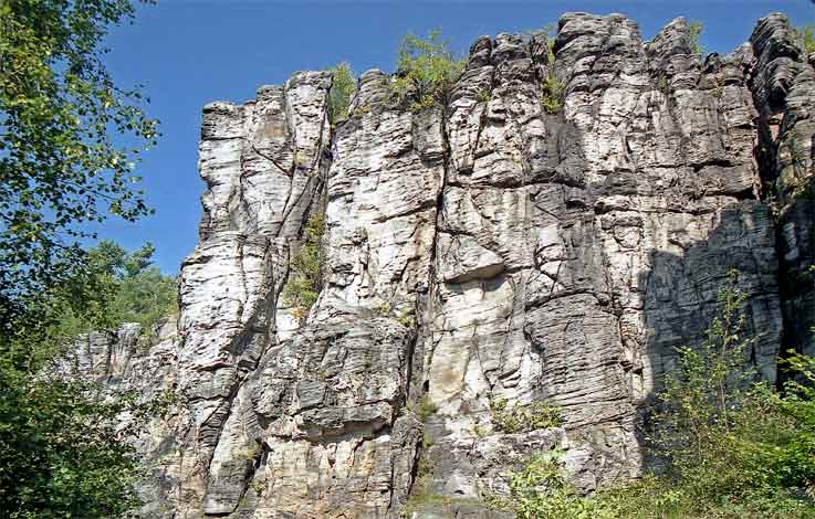 Skalní město u Holého vrchu autor:Zp